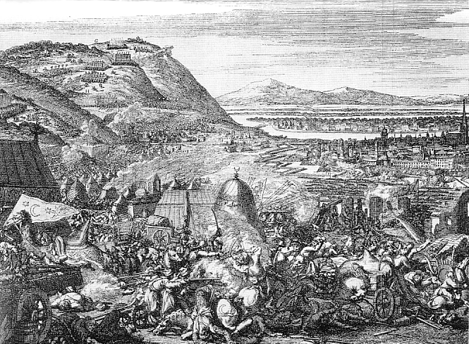 2. Türkenbelagerung; Entsatzheer in der Schlacht am Kahlenberg